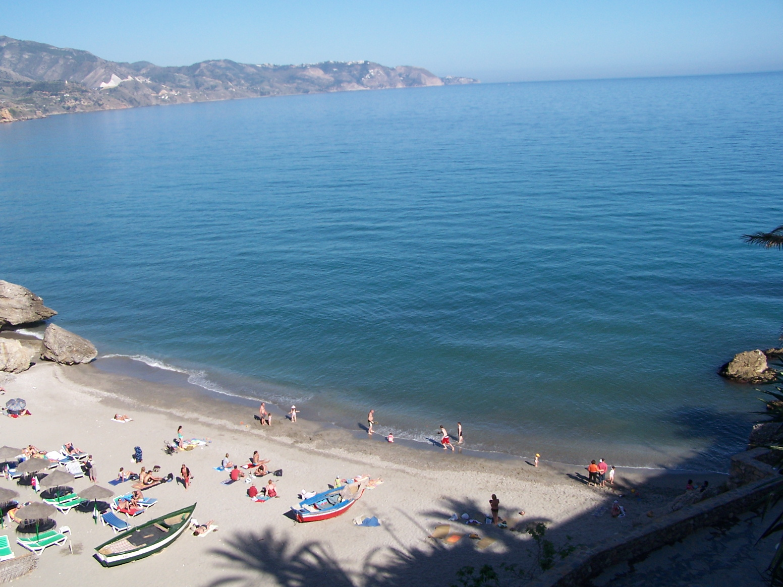 Plage de la Calahonda